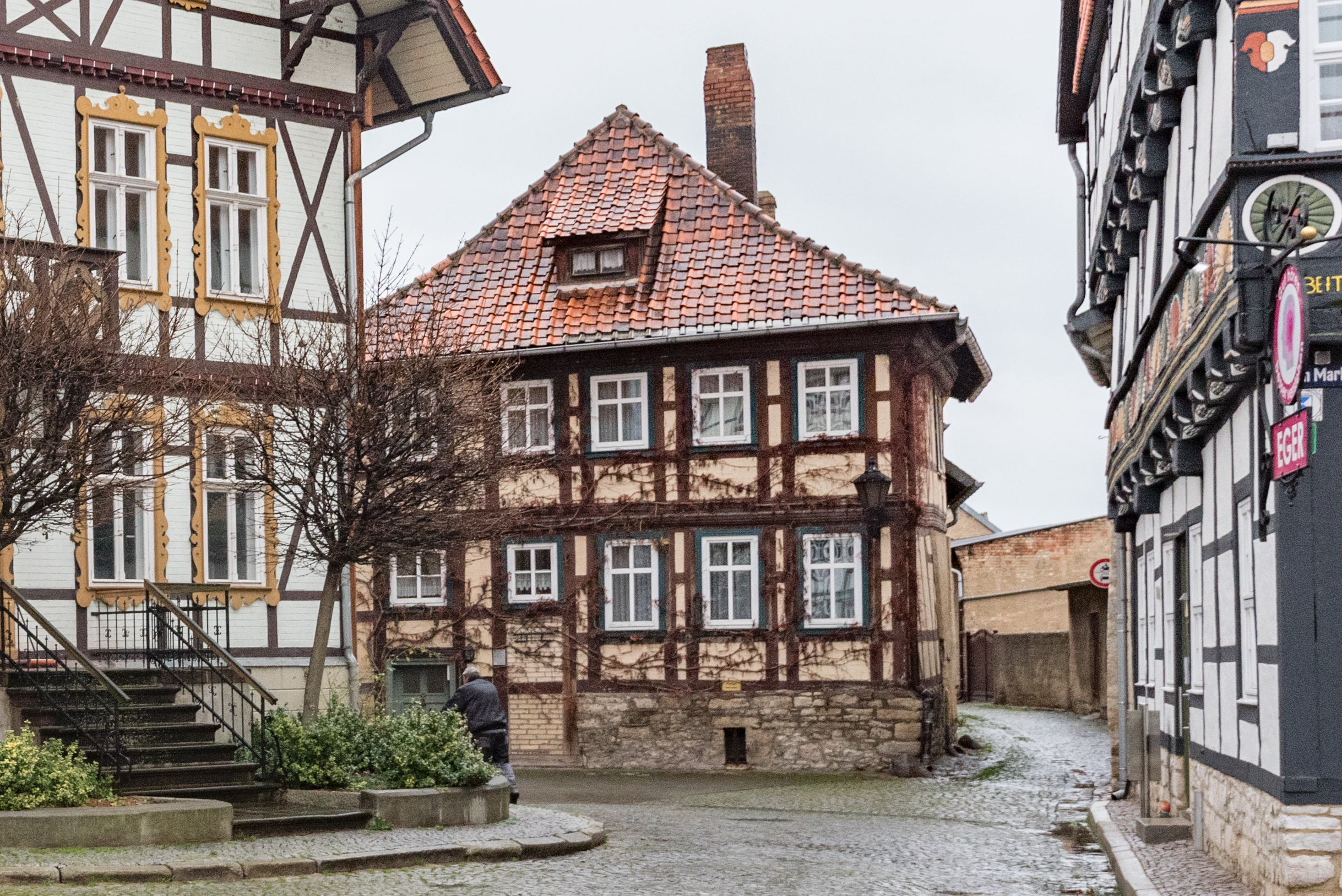 Am Markt 13 Osterwieck